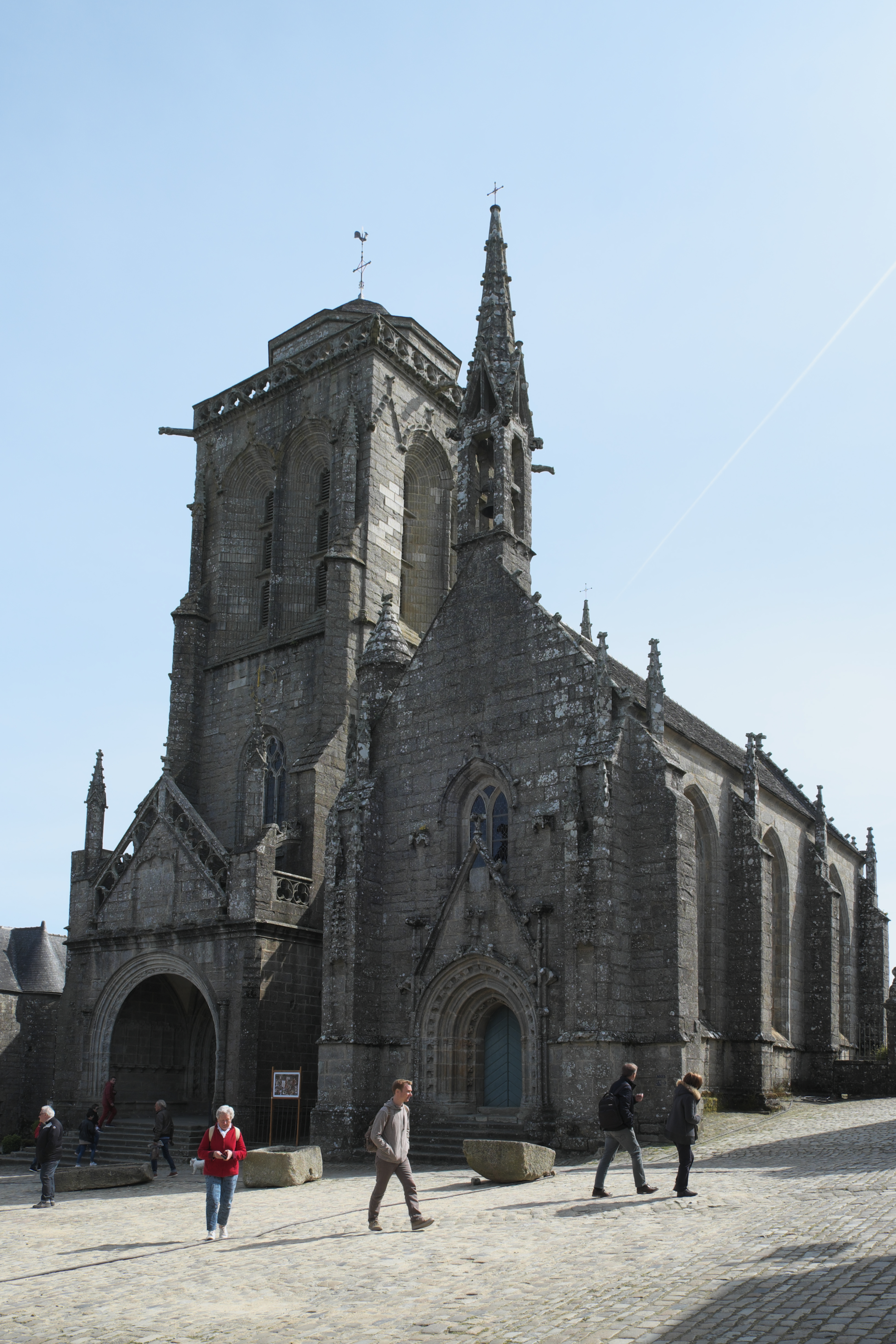 Katholische Kirche Saint-Ronan in Locronan im Département Finistère (Region Bretagne/Frankreich)